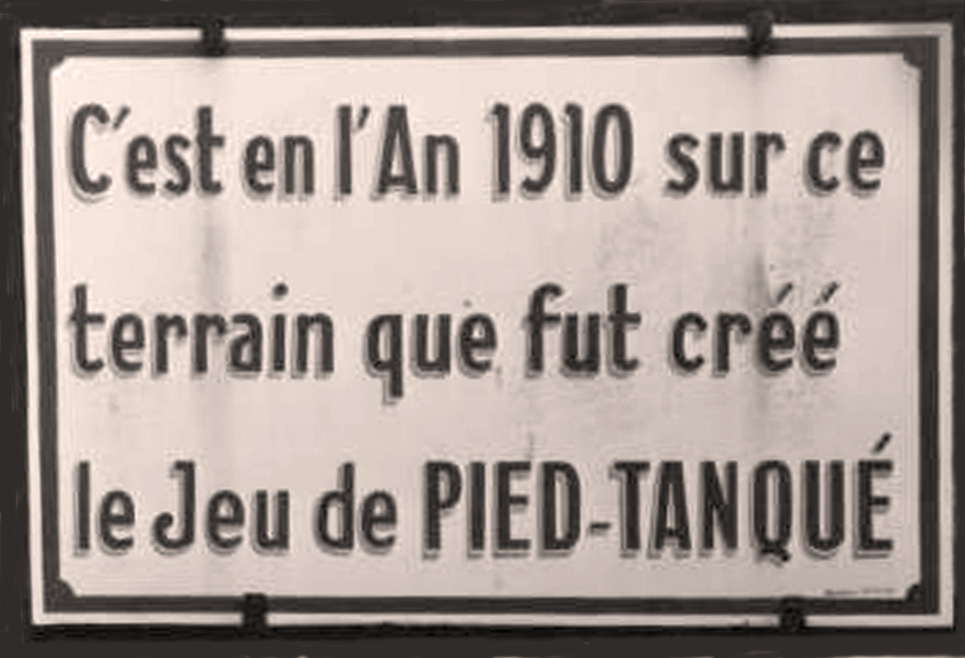 Plaque commémorative au boulodrome de La Ciotat rappelant que ce fut ici qua fut créé le jeu de pétanque en 1910 par Jules Le Noir